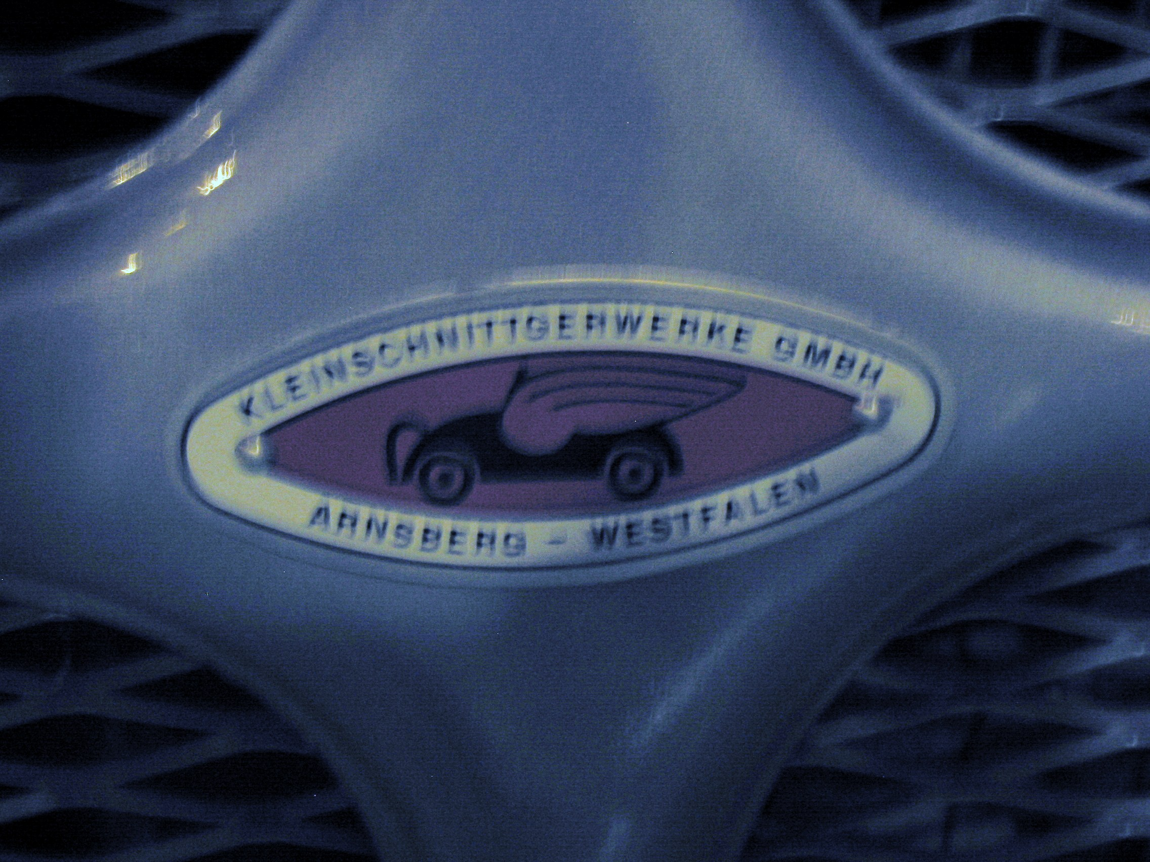 Emblem Kleinschnittger